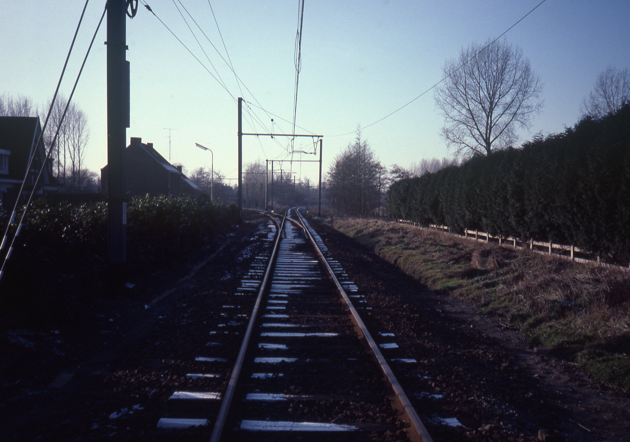 De aftakking 13/1 richting Duffel bij Kontich. Rechts de spoorlijn 13 naar Kontich station